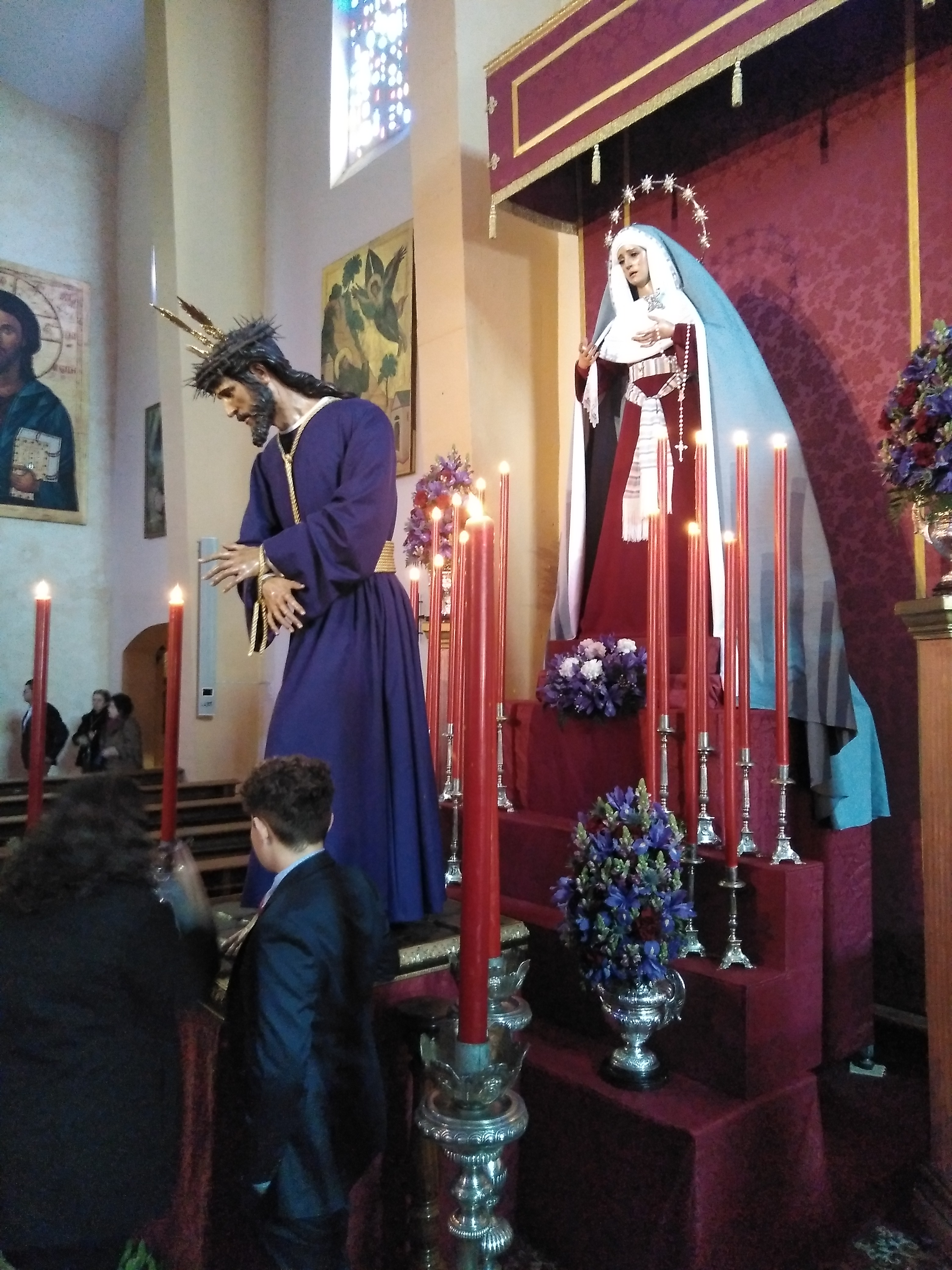 titulares de la Hermandad de La Entrega de Guadalcacín, Jerez de la Frontera